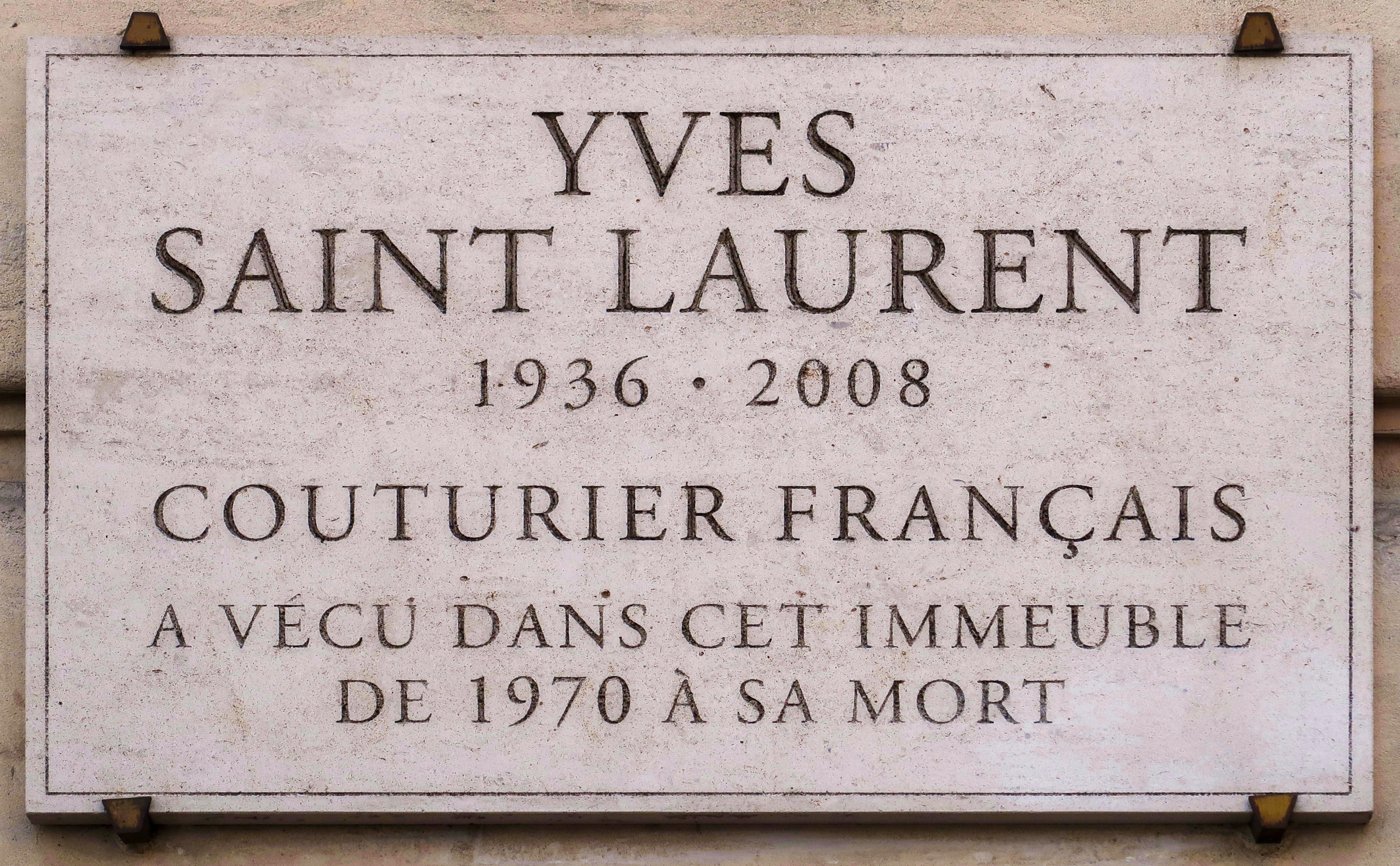 Plaque en hommage à Yves-Saint-Laurent, 55 rue de Babylone (Paris, 7e).